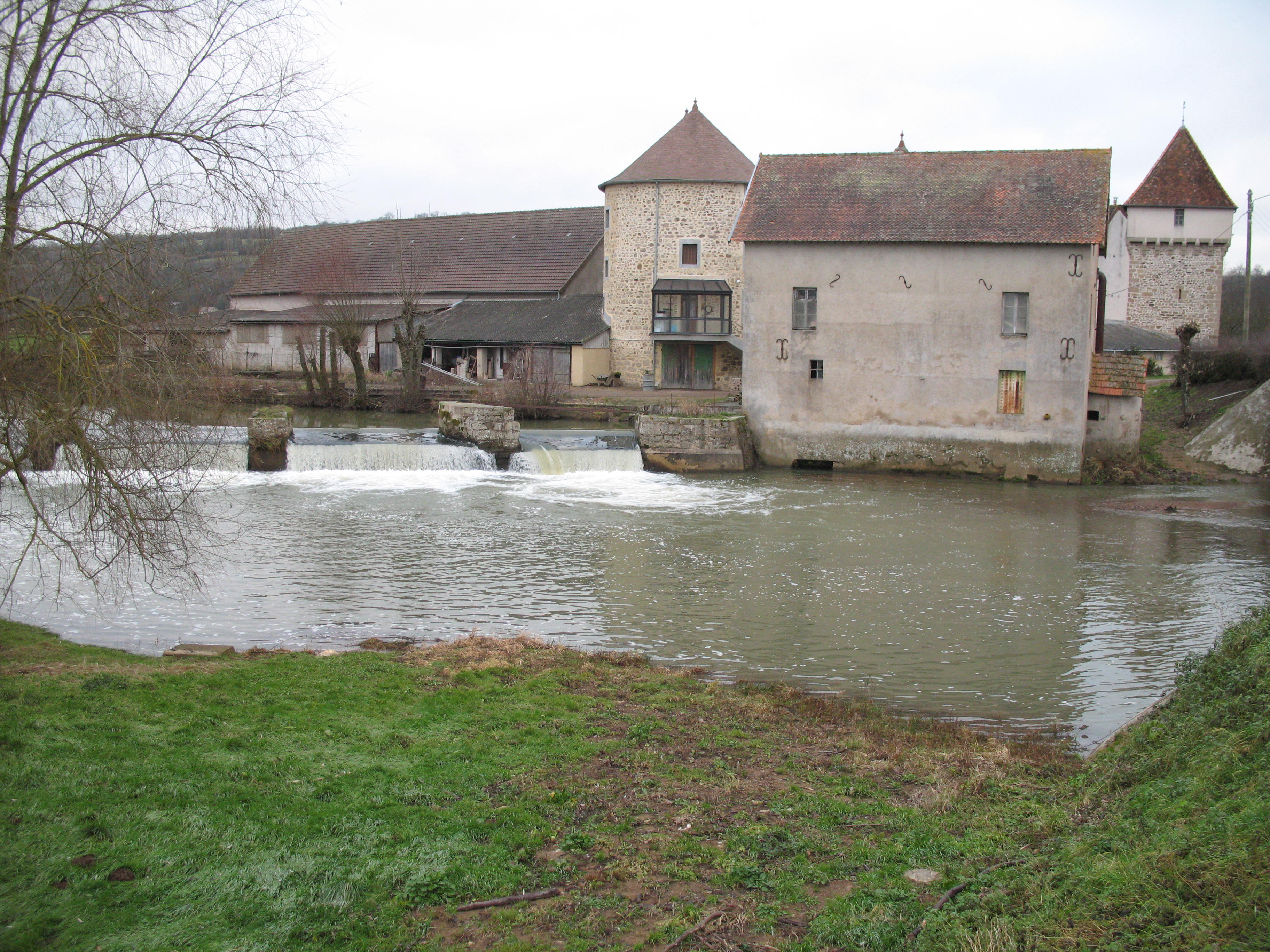 Le château d'Igornay, en Saône-et-Loire, commandait l'Arroux